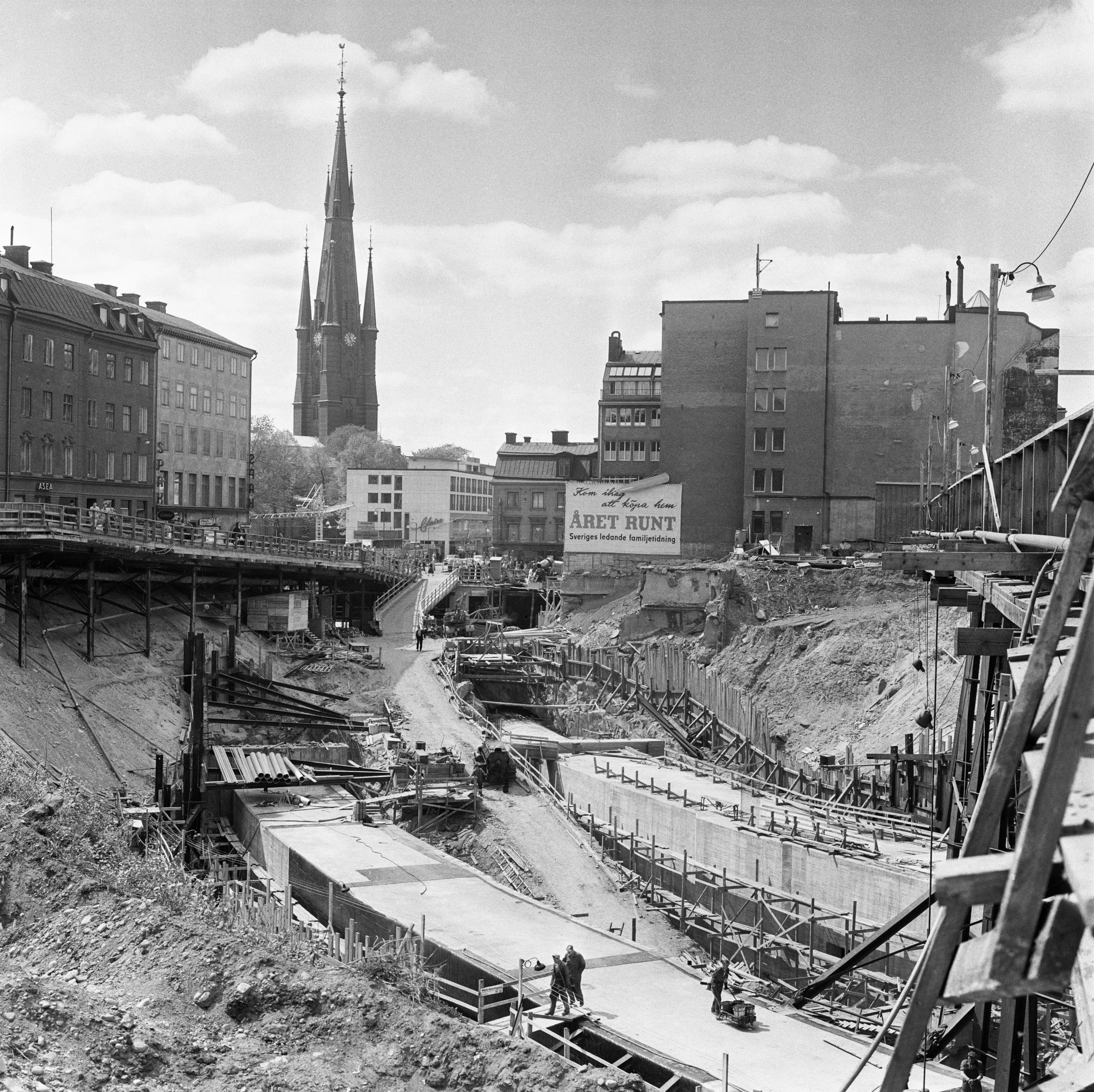 Tunnelbanebygget i Klara. Kvarteret Gropen, Hägern större och Sporrens östra del är rivna. T.v. går Klarabergsgatan på provisoriskbro och t.h. går Mäster Samuelsgatan på provisoriskbro.